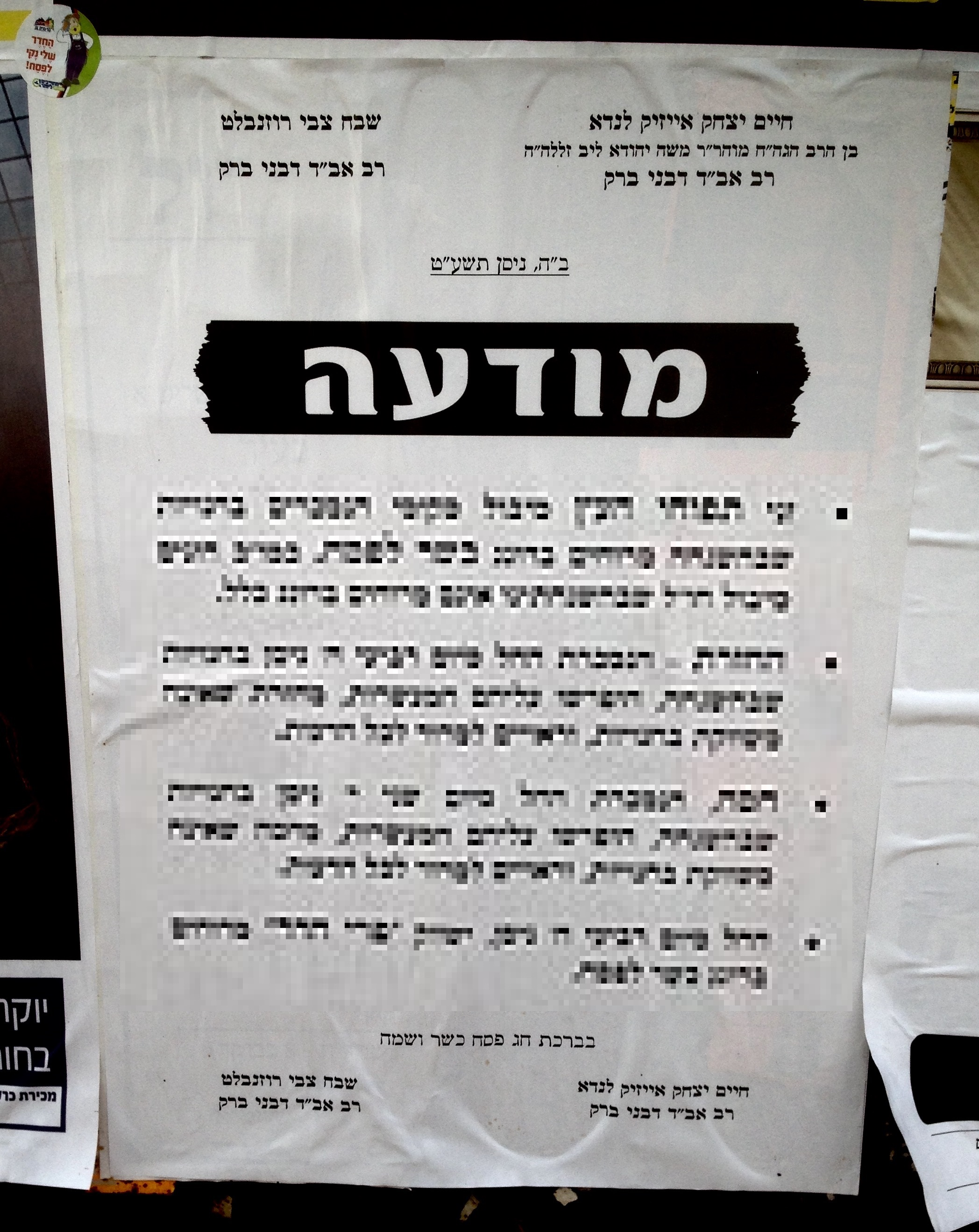 מודעה ברחובות בני ברק משותפת לרבנים לנדא ורוזנבלט